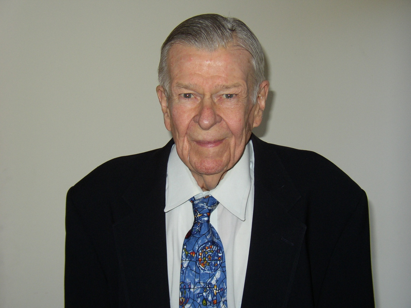 Picture Bernard J. Lechner (2011)